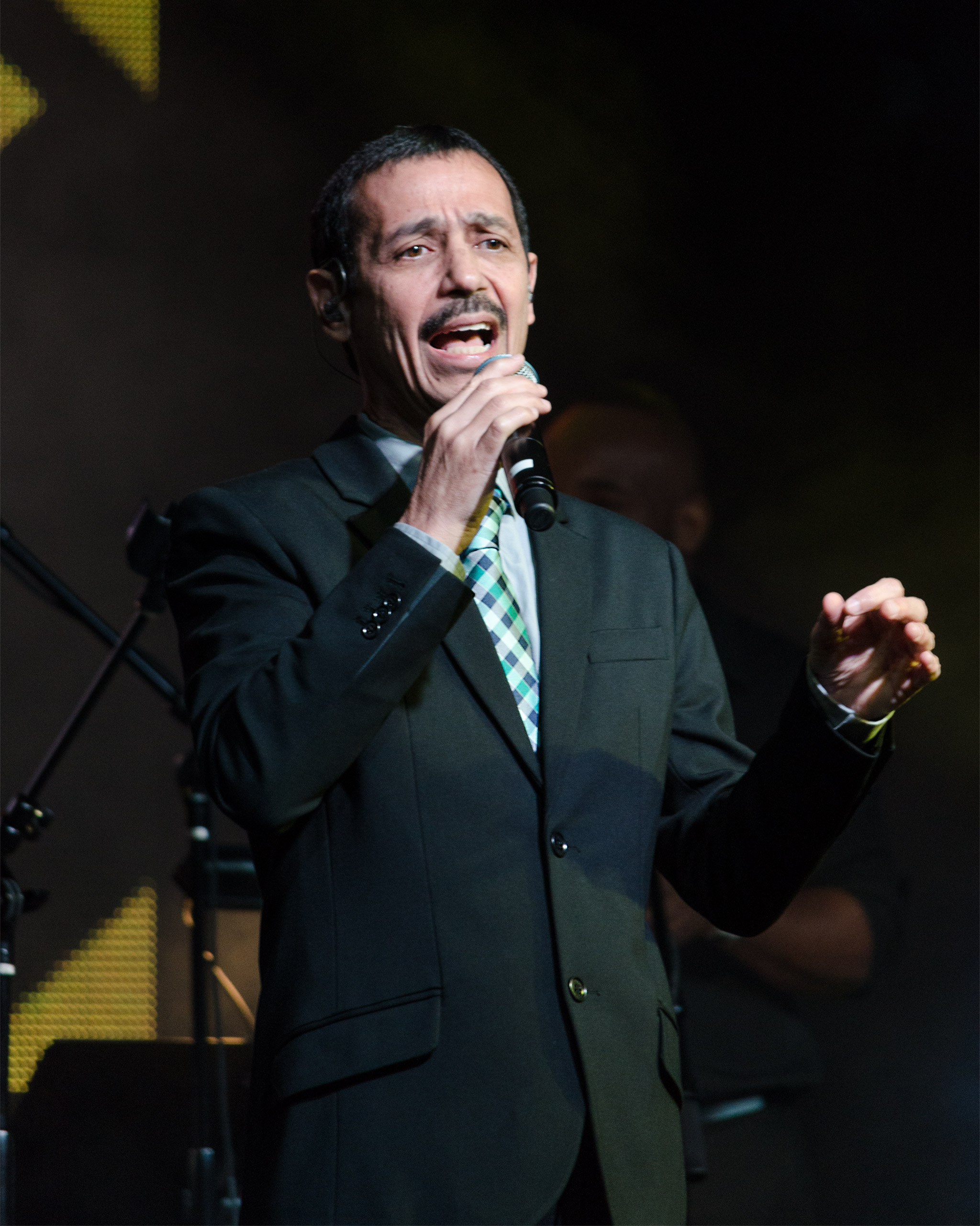 eddie santiago poso luego de una entrevista concedida al diario el tiempo